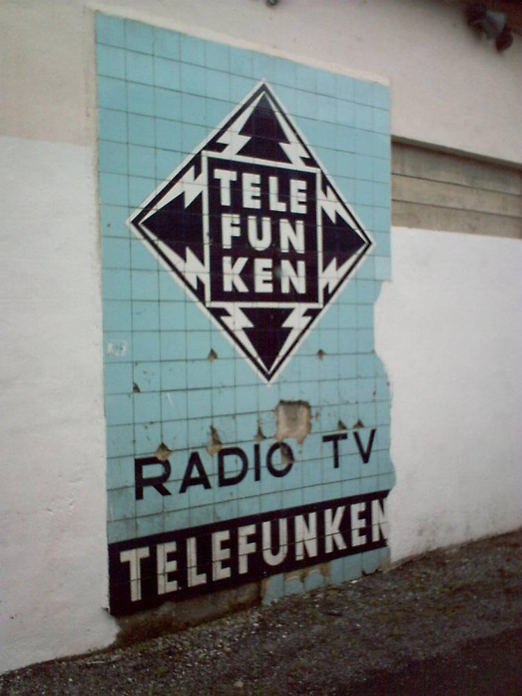 Telefunken etxearen azulejo bidezko publizitatea, 20. mendean Mendaroko tren geltokian zegoena. 21. mendean suntsitu zen.